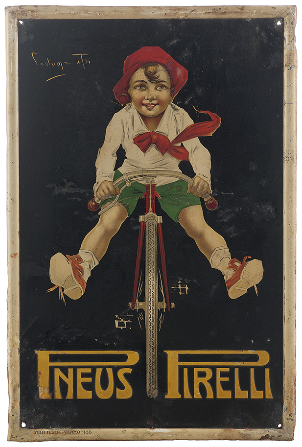 Targa Pirelli disegnata da Codognato